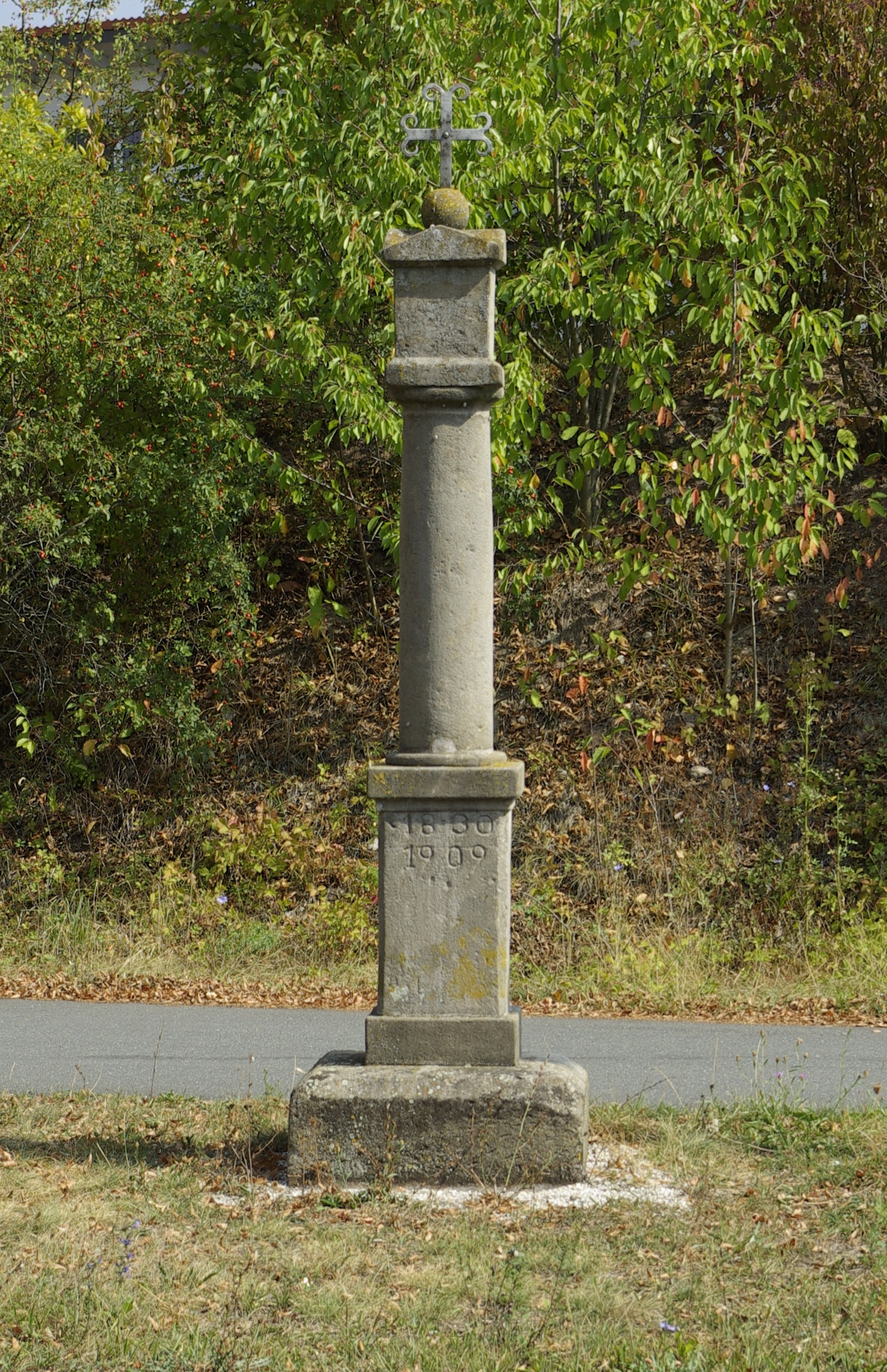 Die Weiße Marter im Erlanger Stadtteil Büchenbach.